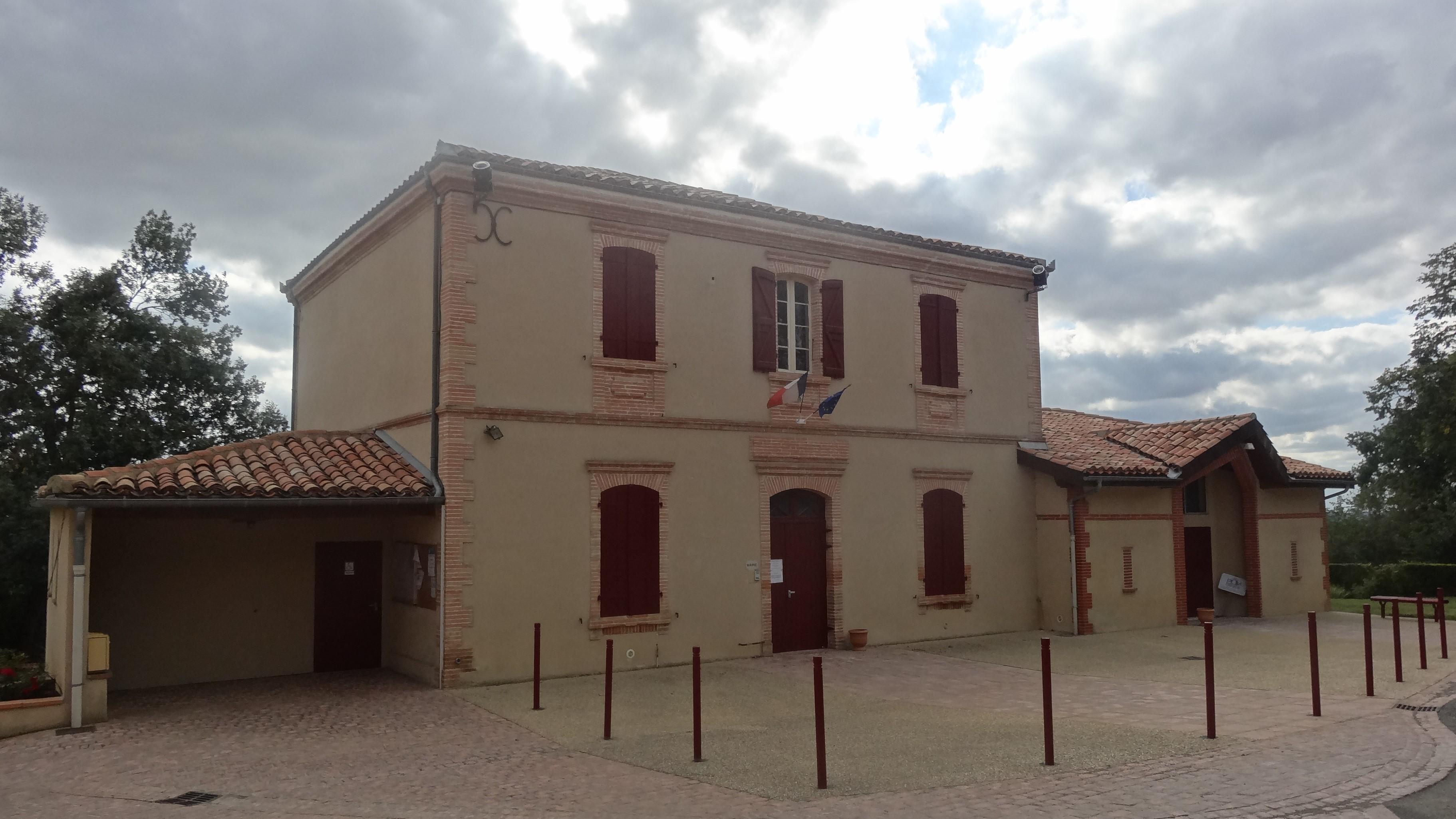 Mairie de Montiron.